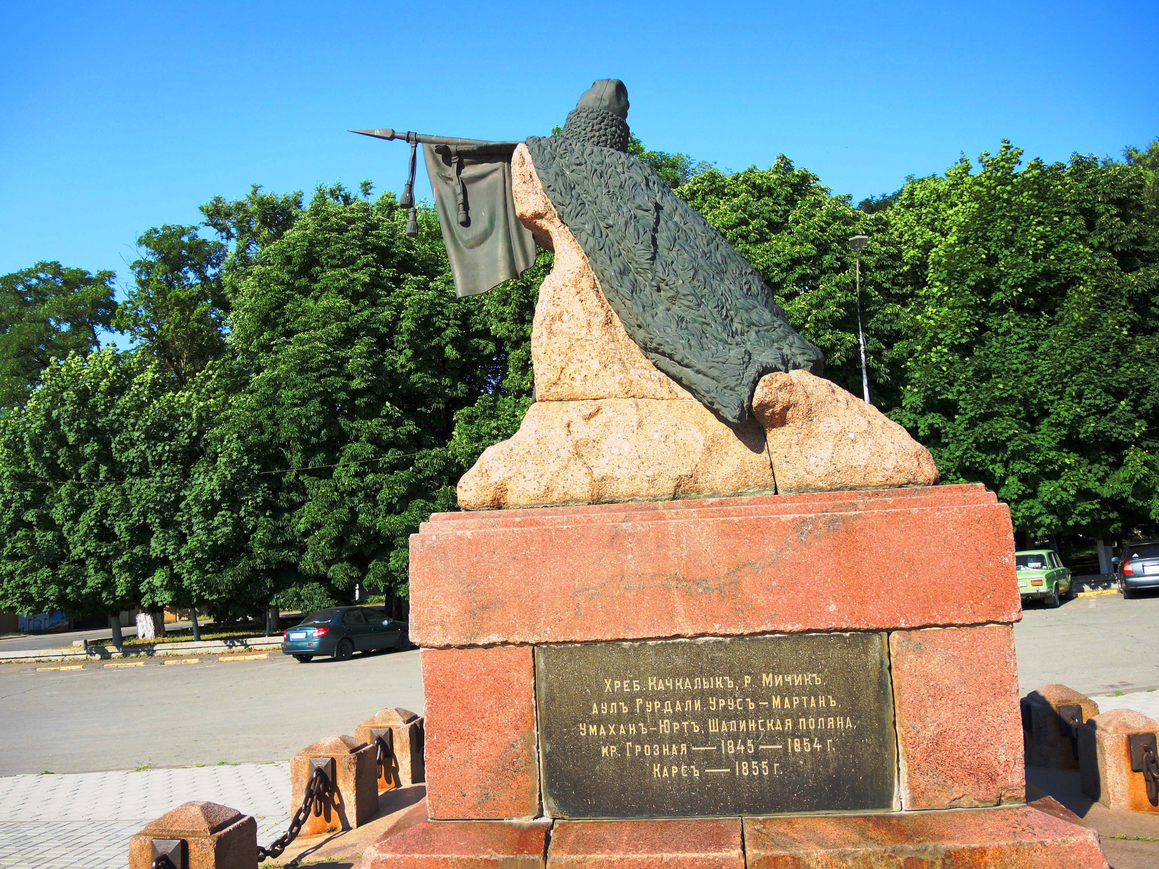 Памятник Я.П. Бакланову - походному атаману кавказских войн: площадь Ермака, 1, Новочеркасск, Ростовская область